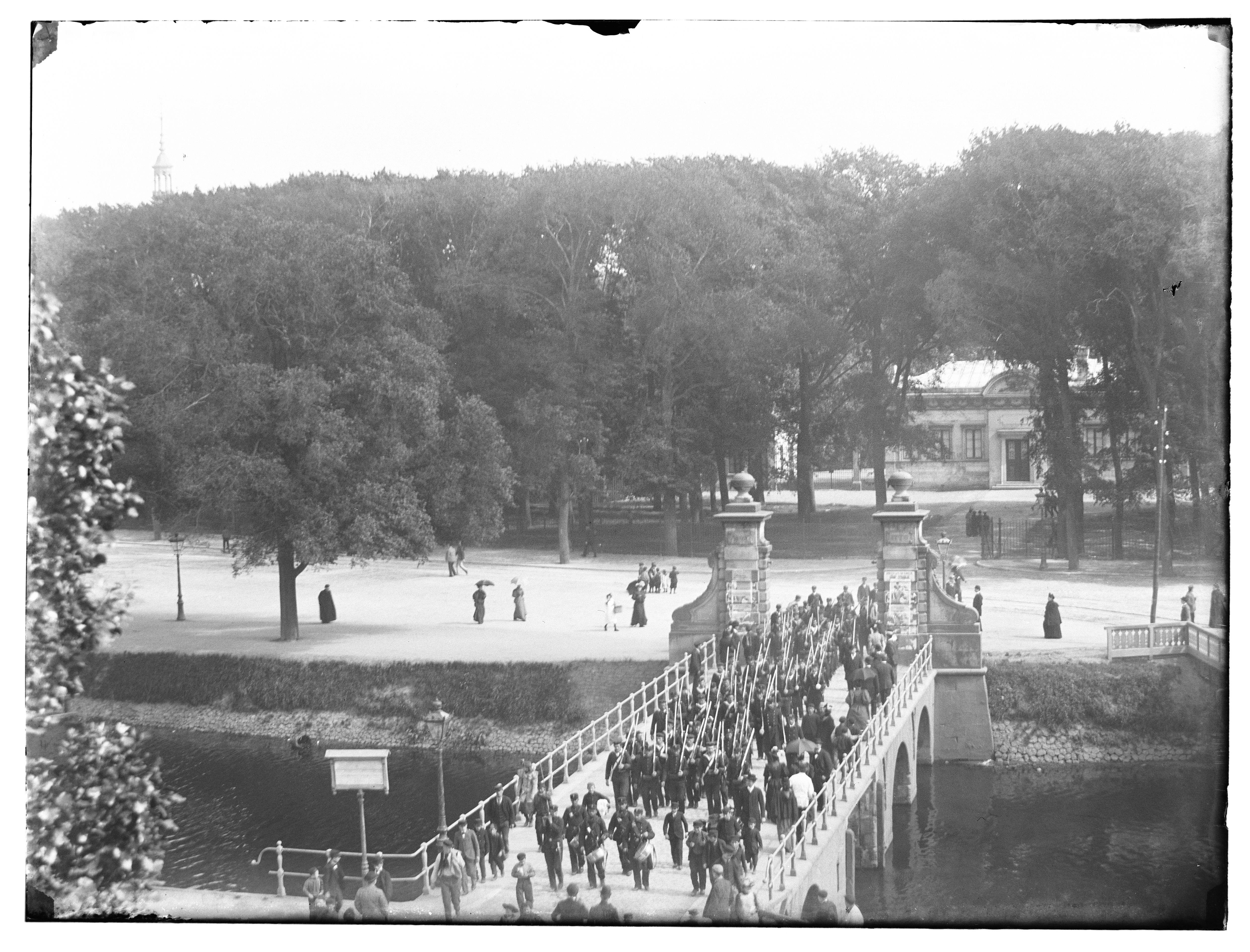 Beschrijving Singelgracht Gezien vanaf Muiderpoort naar Mauritskade met brug nr.265. Op de achtergrond het Muiderbosje met de ingang van de Oude Oosterbegraafplaats. Documenttype foto Vervaardiger Olie``, Jacob (1834-1905) Collectie Collectie Jacob Olie Jbz. Datering 24 mei 1895 Geografische naam Mauritskade Oude Oosterbegraafplaats Singelgracht Inventarissen Afbeeldingsbestand 010019000755 Generated with Dememorixer